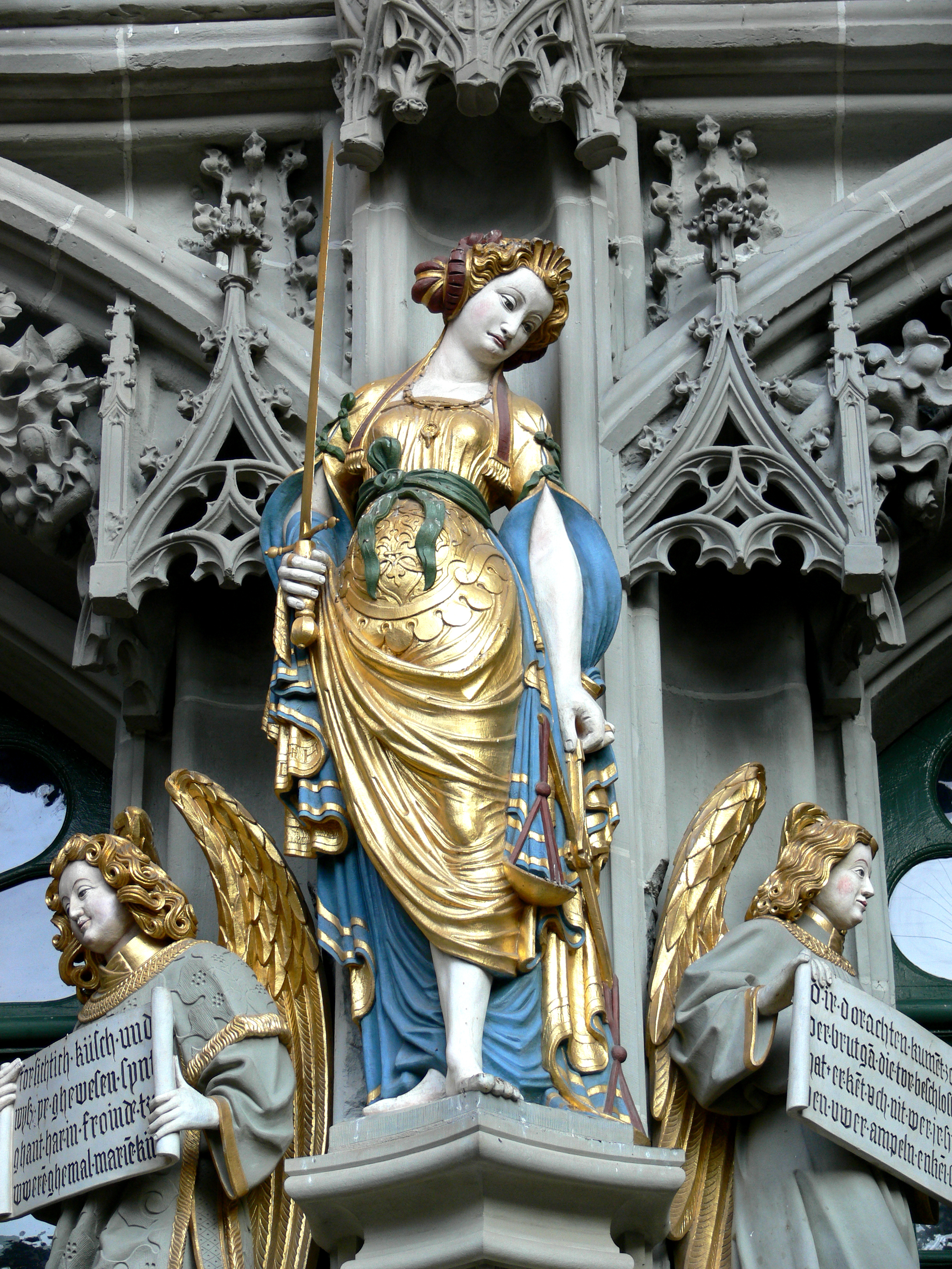 Bern, Münster, Hauptportal